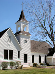 Nelsonville Brethren Church, Nelsonville, Texas